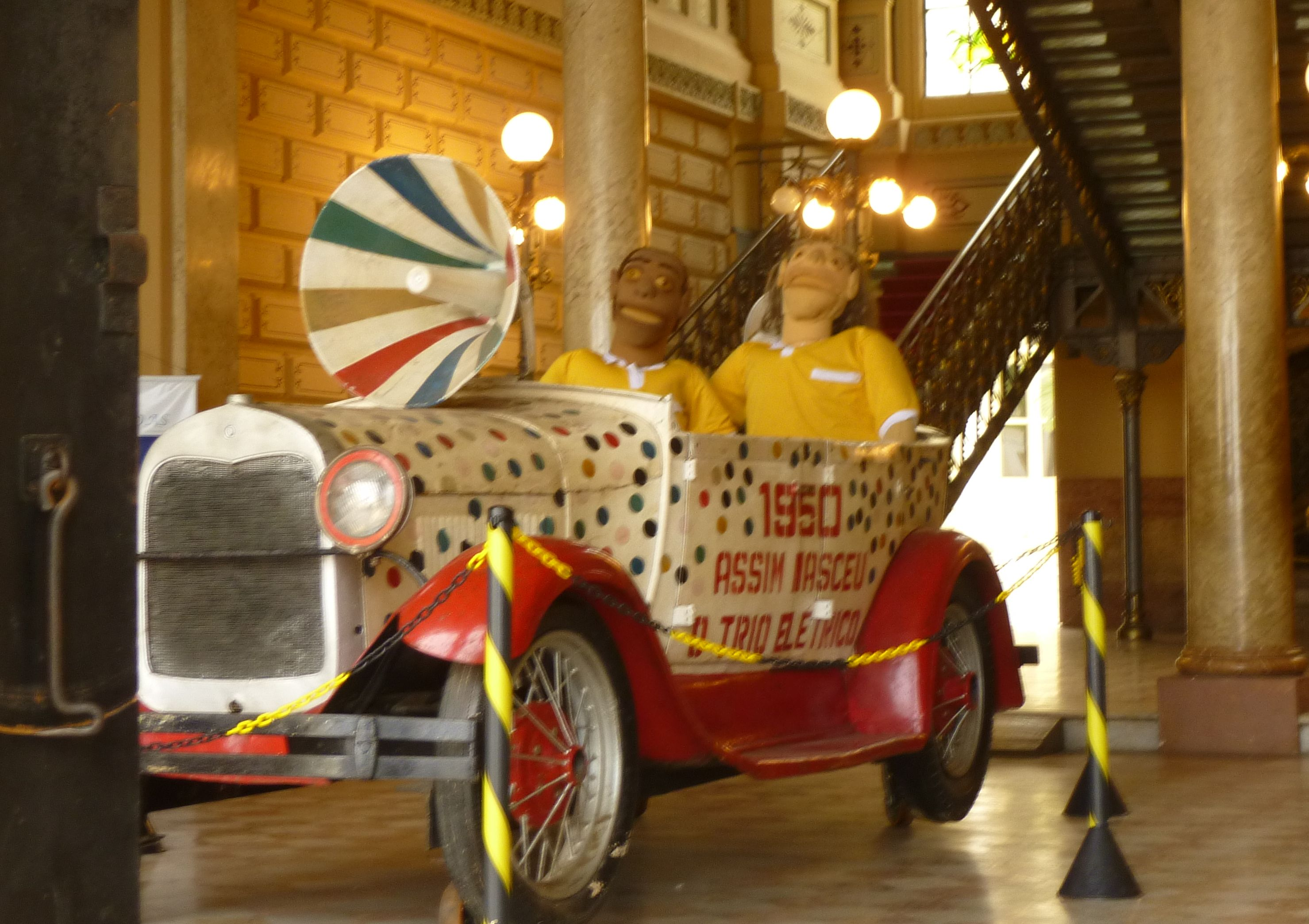 Erster Trio Eletrico Brasiliens